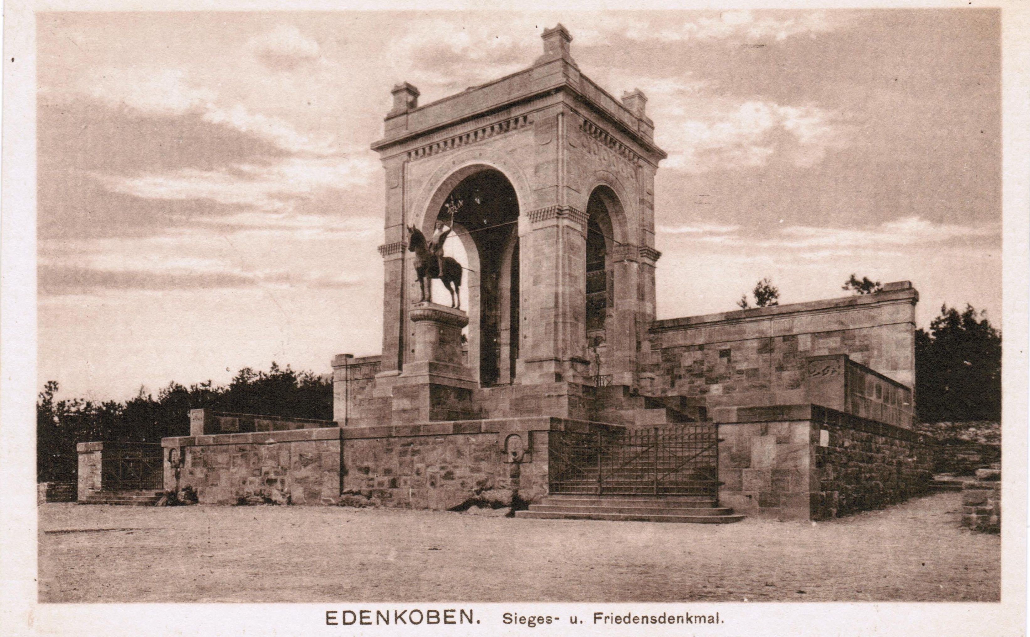 Sieges- und Friedensdenkmal bei Edenkoben, Pfalz; erbaut um 1895 nach Entwurf bzw. Modell von Bildhauer August Drumm (München)